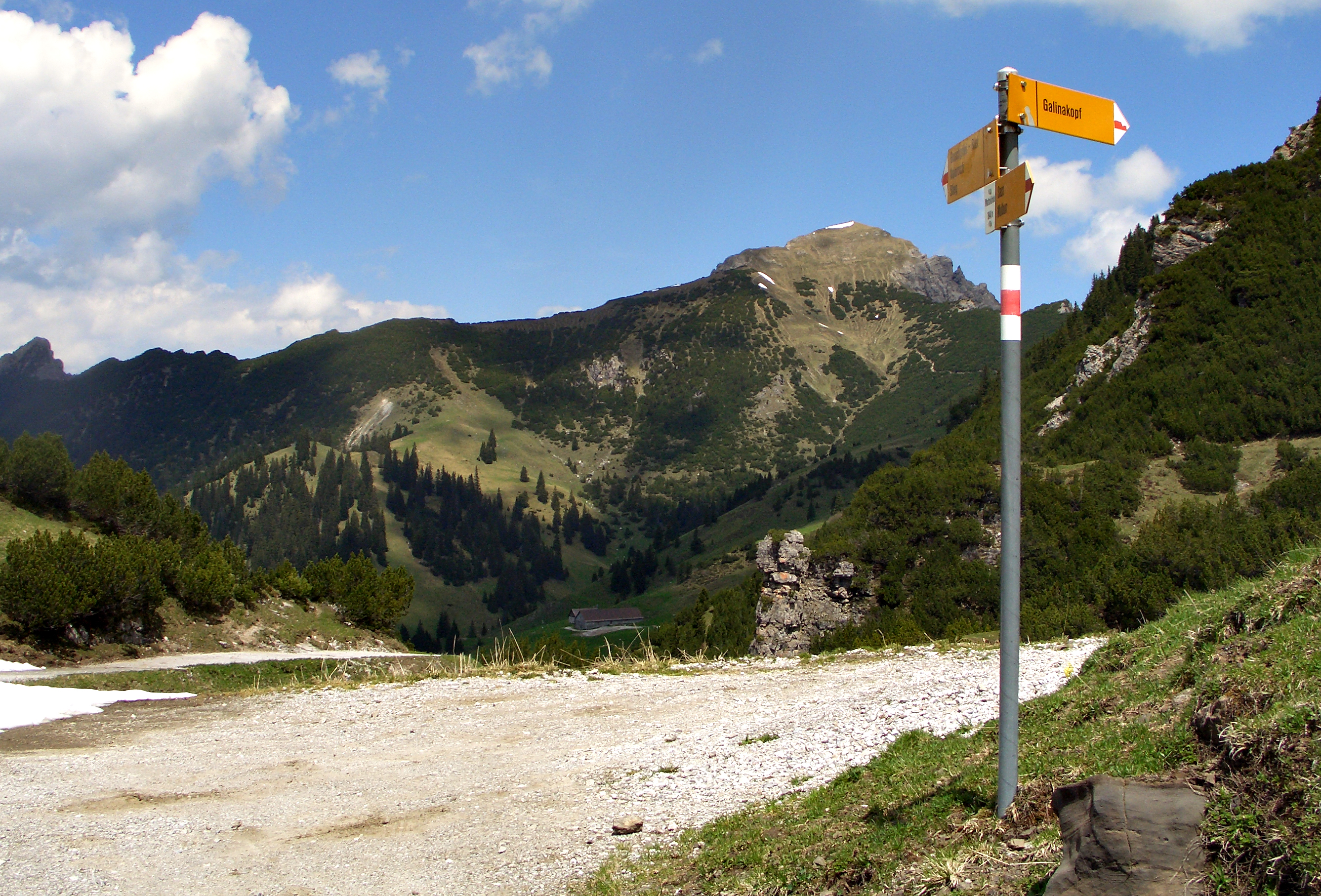 Galinakopf von Süden (Liechtenstein)